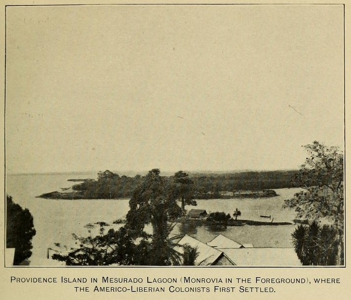 Providence Island in Mesurado Lagoon